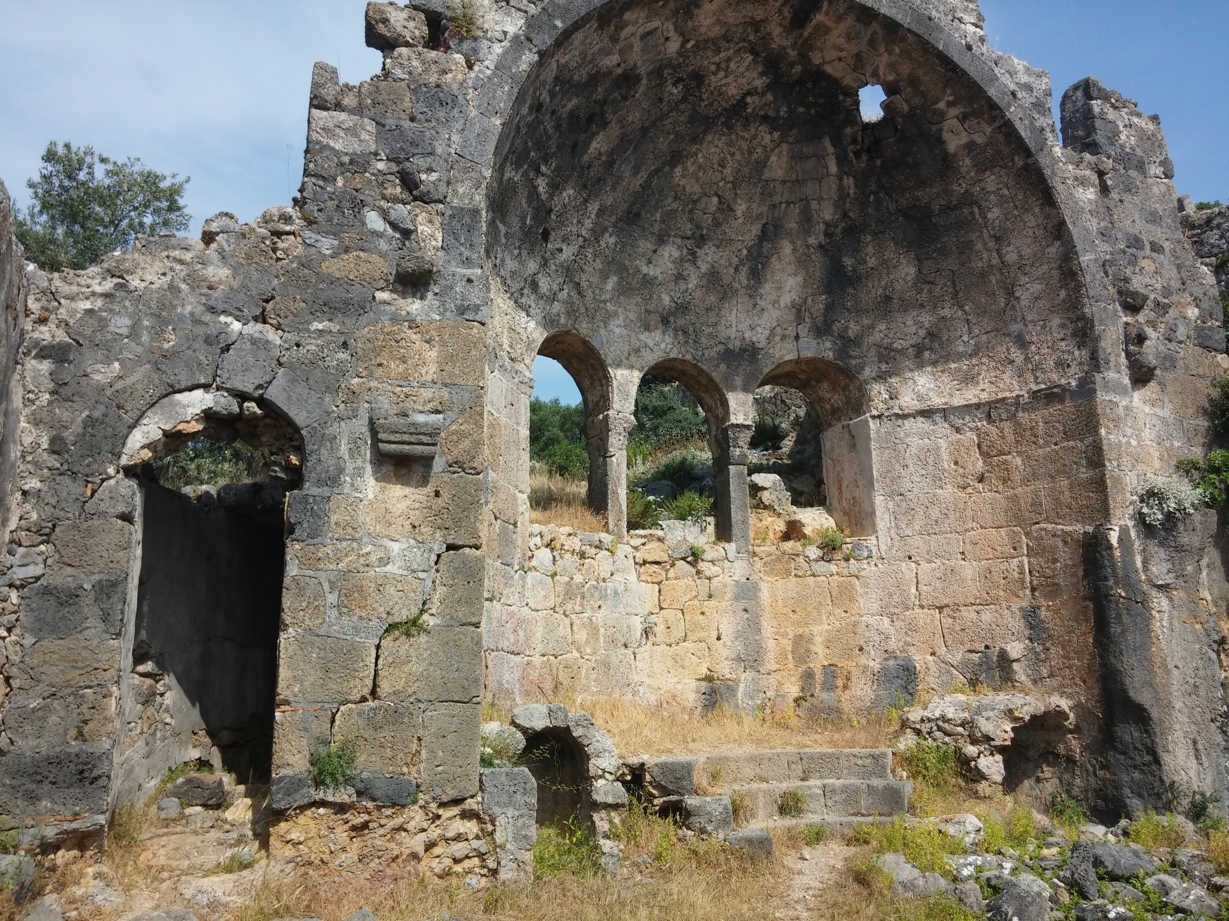 Gemiler Adası'ndaki 2 numaralı kilisenin kalıntısı.